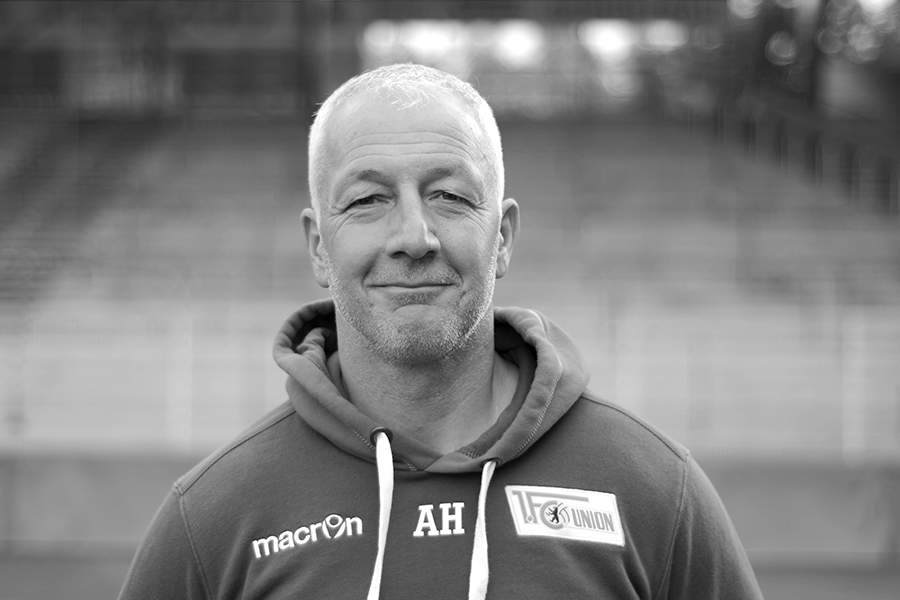 Mannschaftsfoto 2015/16